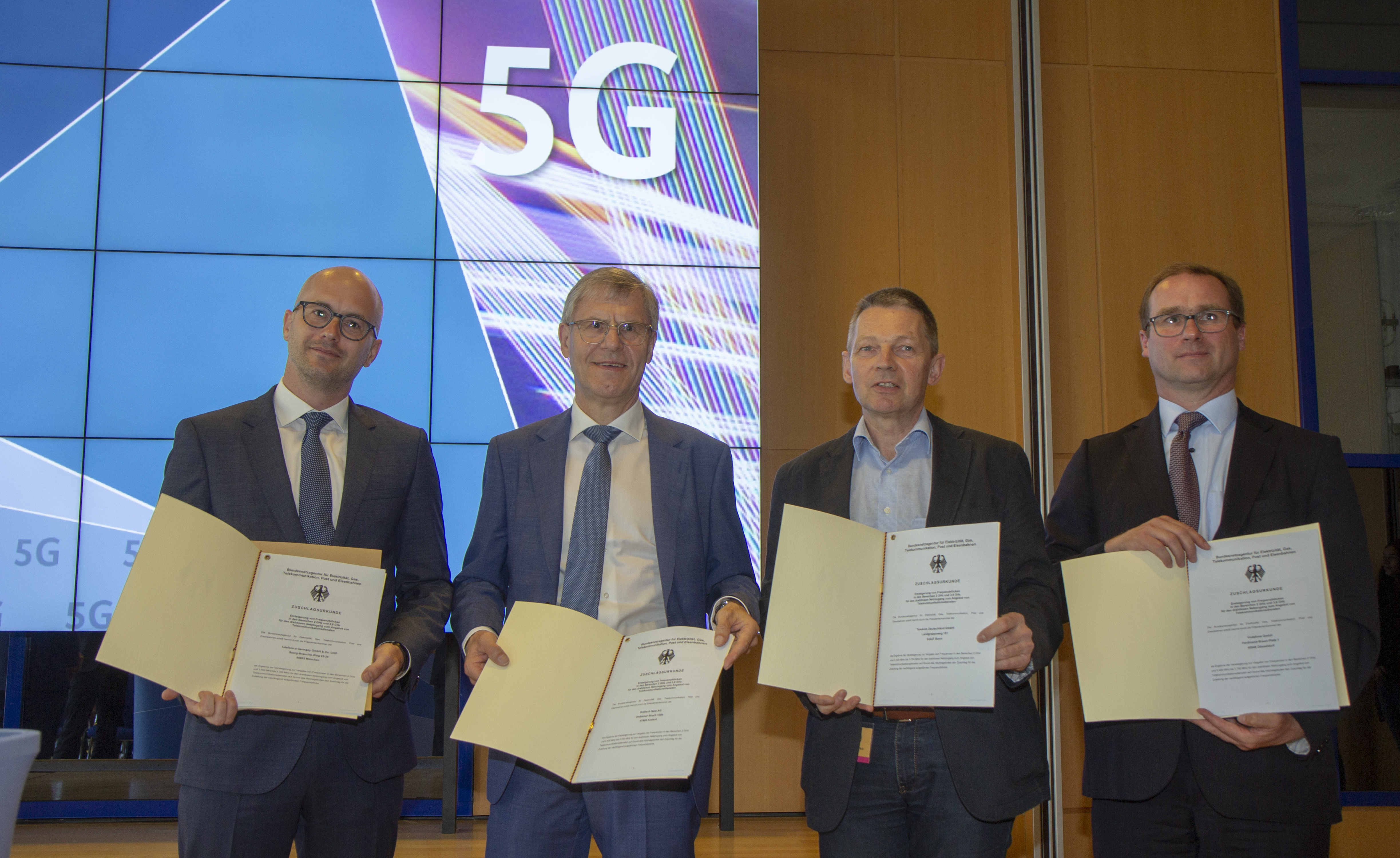 Übergabe der 5G-Zuschlagsurkunden an die Unternehmen. Von links nach Rechts: Télefonica Germany GmbH & Co. OHG, Drillisch Netz AG, Telekom Deutschland GmbH, Vodafone GmbH